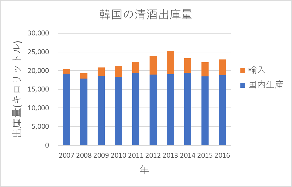 清酒の海外輸出動向とグローバル・サプライチェーン 朝日酒造「久保田」の韓国輸出のサプライチェーンにおける事例分析を基にExcelで作成